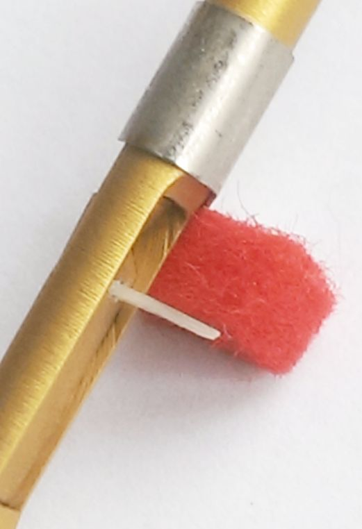 Man sieht den Nylonkiel und den Dämpfer (rot)